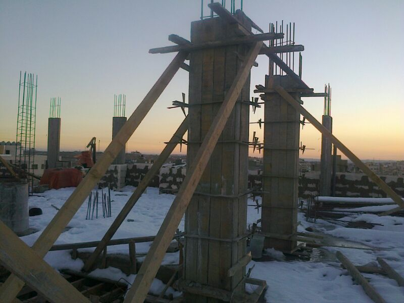 طوبار 9